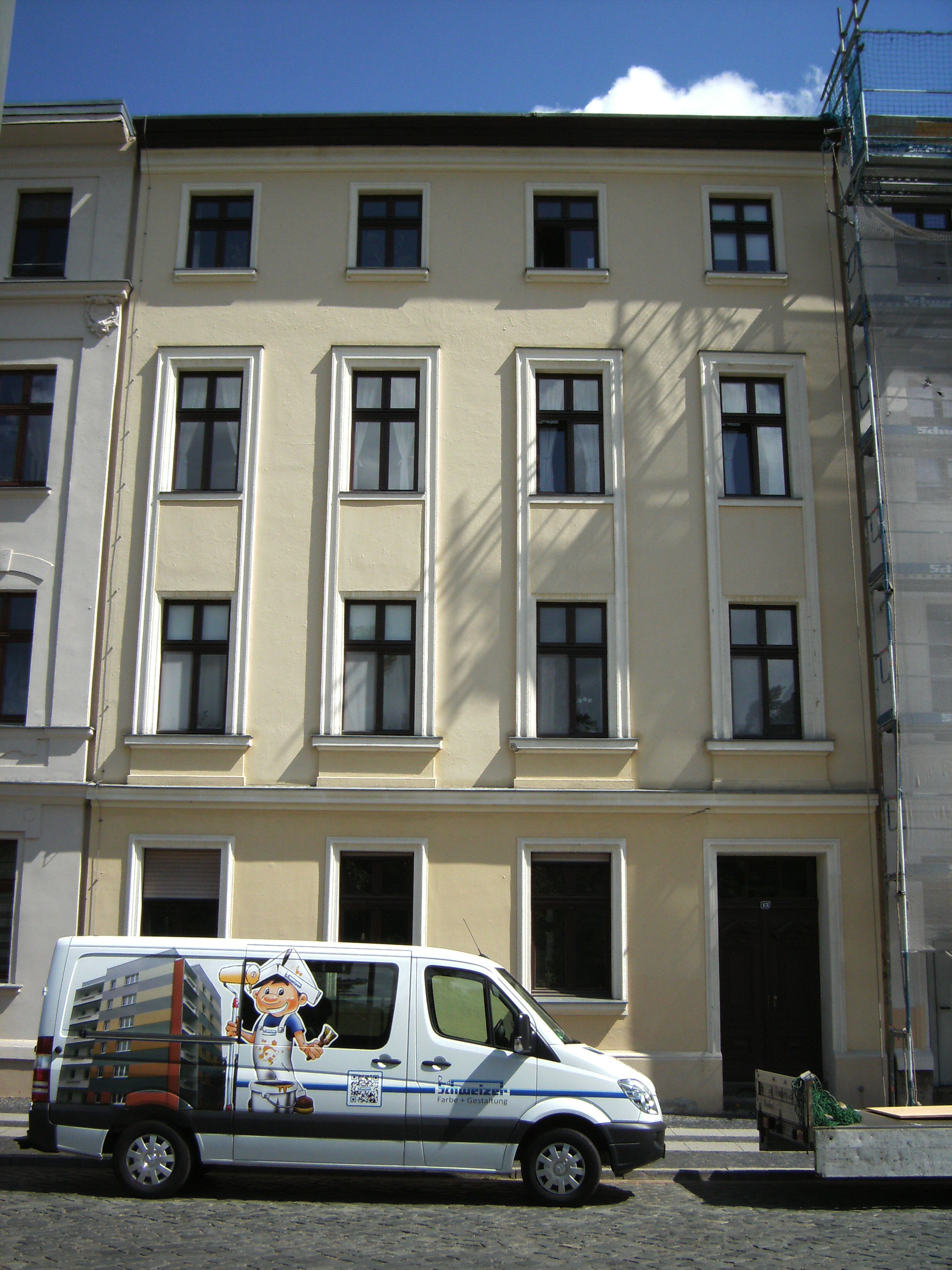 Wernerstr. 13